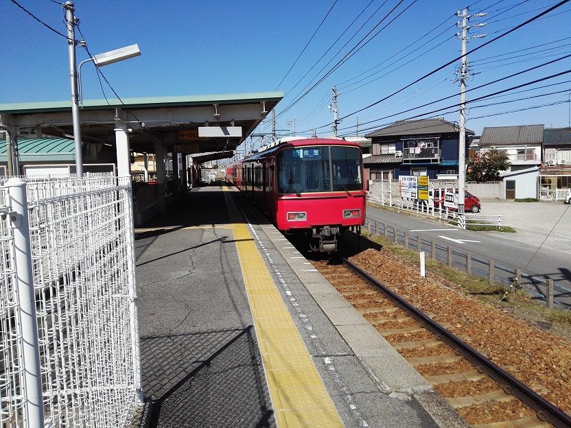 Sakuramachi-mae station platform